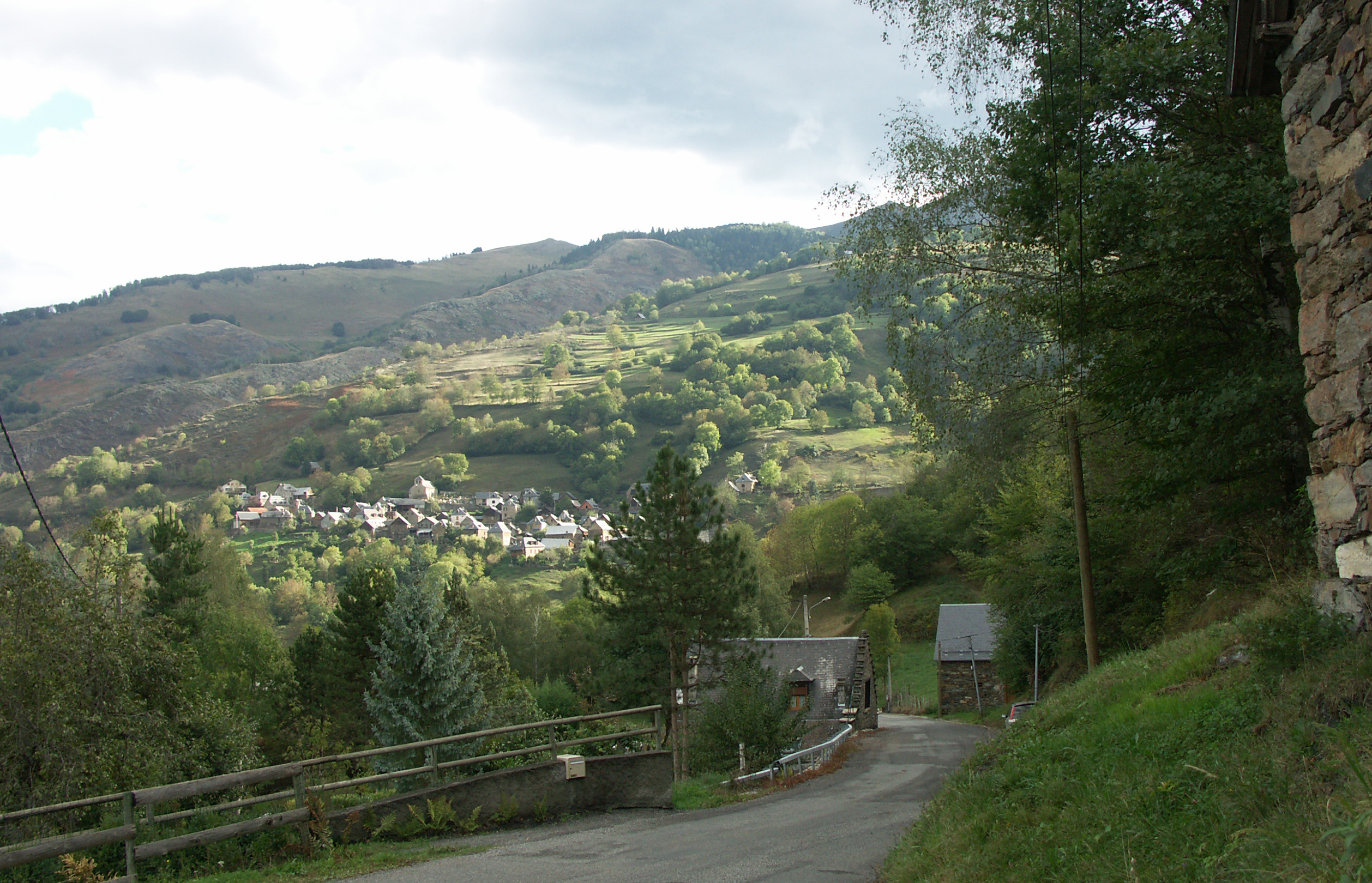 Gouaux-de-Luchon (Haute-Garonne)